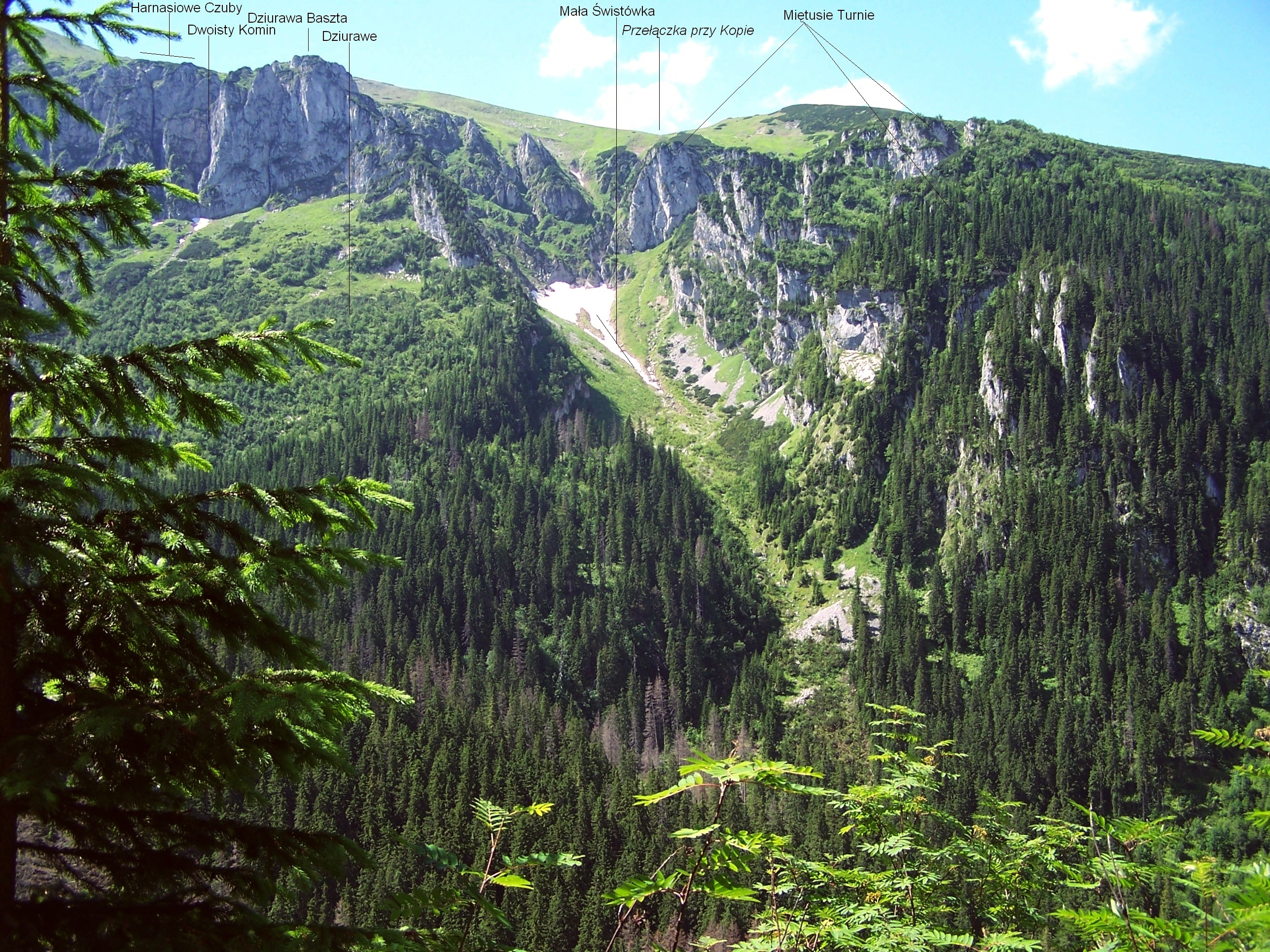 Widok ze stoków Małołąckiego Skoruśniaka